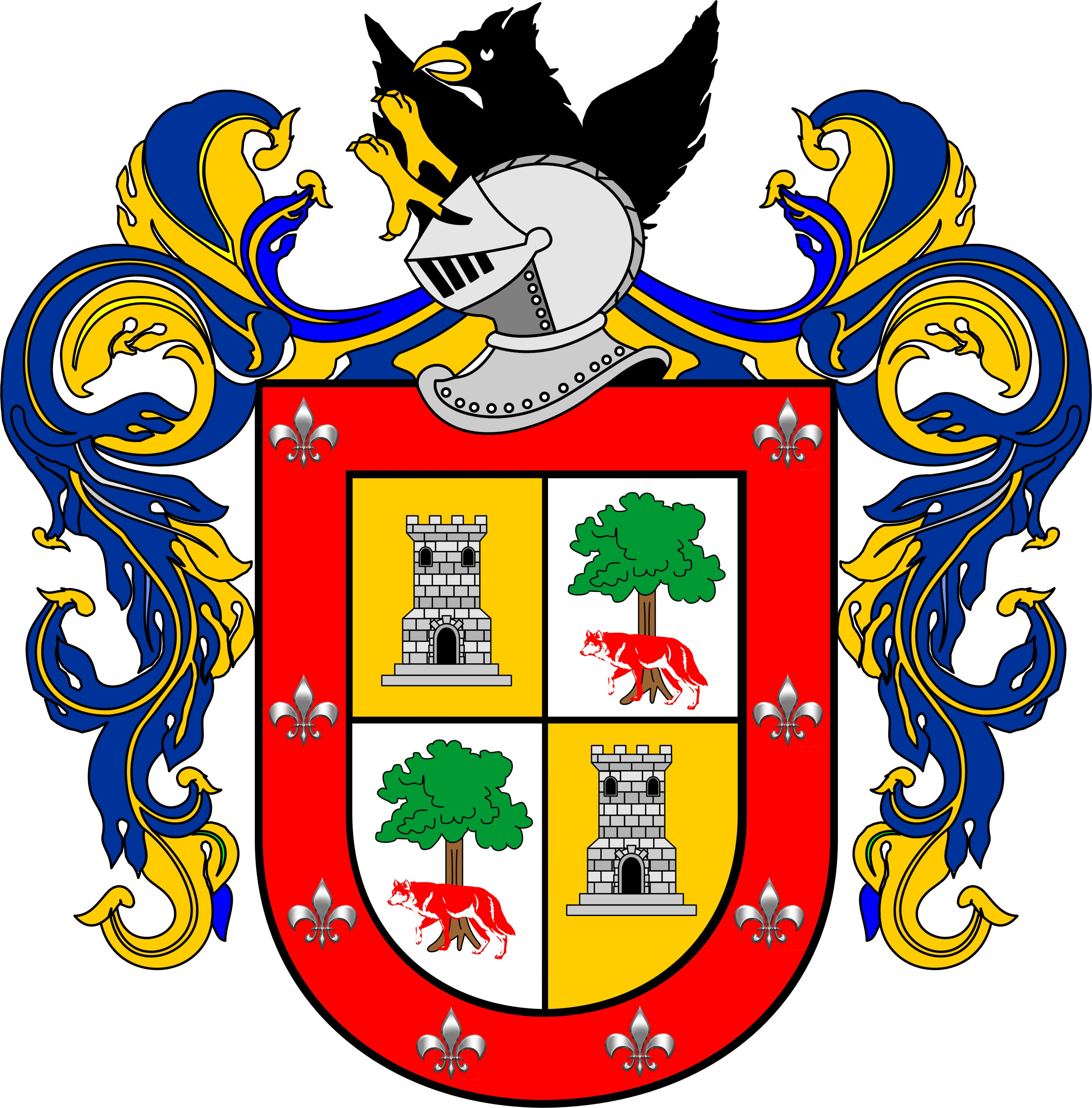 Un escudo que esté hecho dos quartos; que en el uno de ellos de la mano derecha esté un roble verde que le atraviese un lobo rojo en campo de plata, y en el otro quarto una torre de plata en campo oro e por orla ocho flores de lis de plata en campo colorado e un yelmo cerrado y devisa una águila negra con sus erascoles y dependencias a follajes de azul y oro. Archivo General de Indias,QUITO,20B,N.17 .Consultado, diseñado, descifrado y compartido por el historiador Jodison Javier García Alcívar.